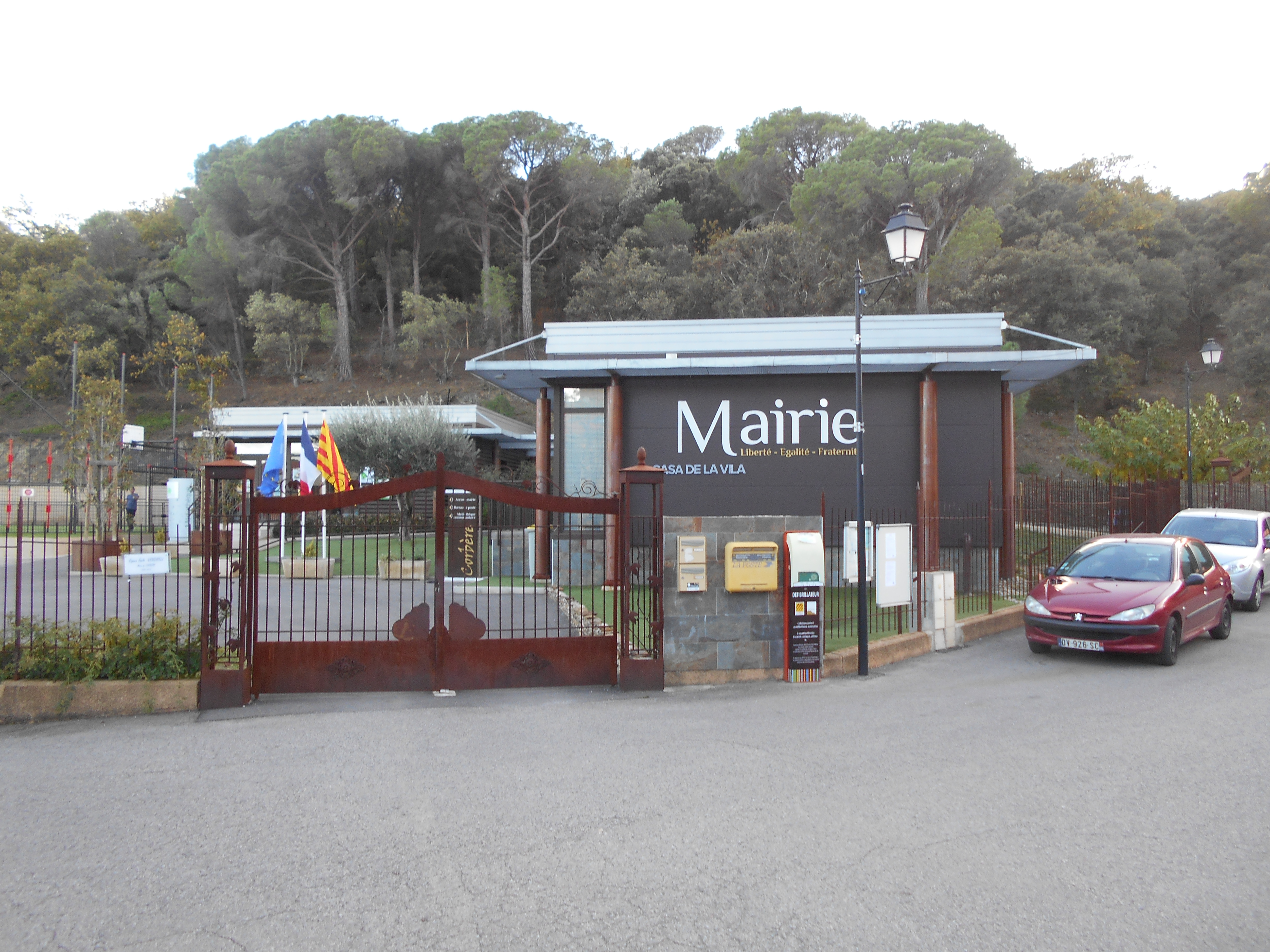 Casa de la Vila de Corbera. al Rosselló